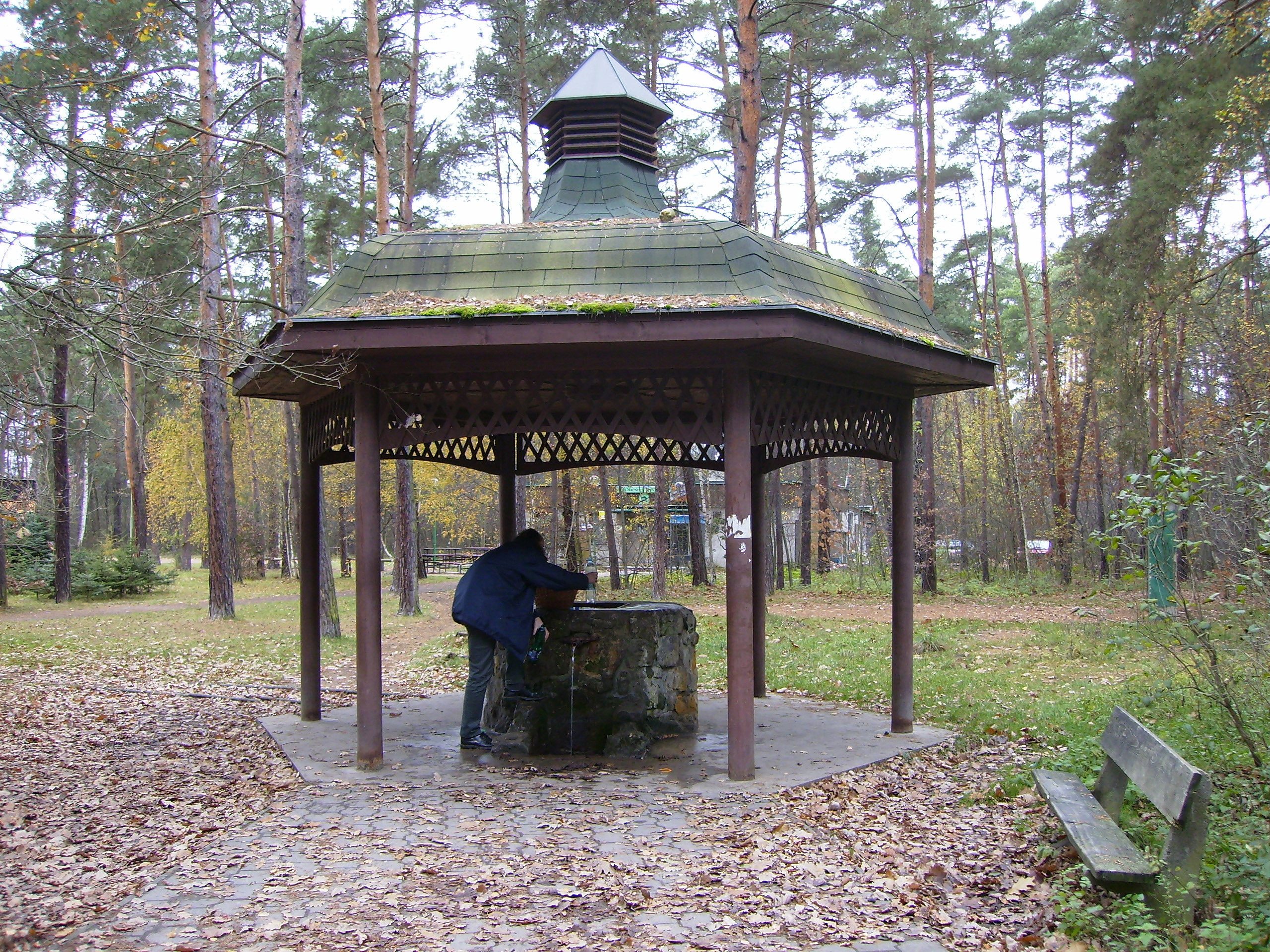 Pramen sv. Josefa ve středočeském Kersku.